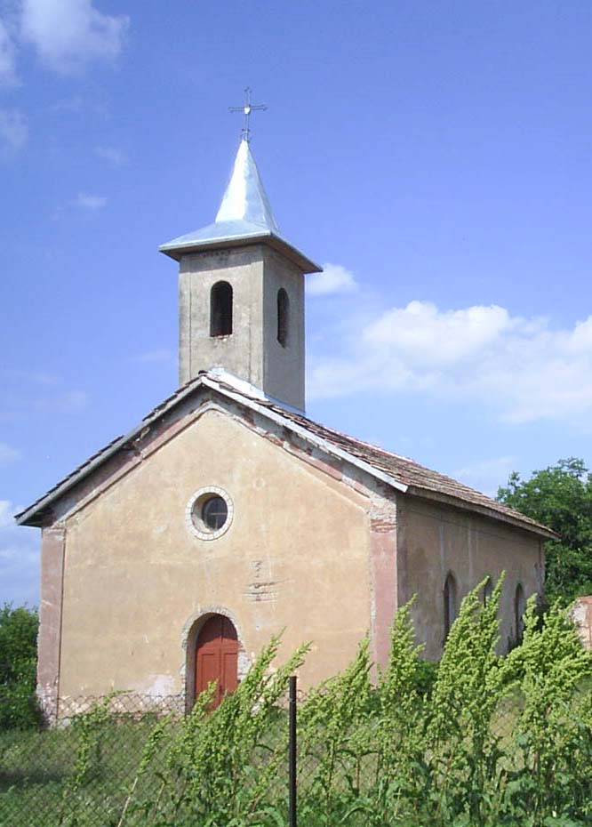 Католическа "банашка" църква.